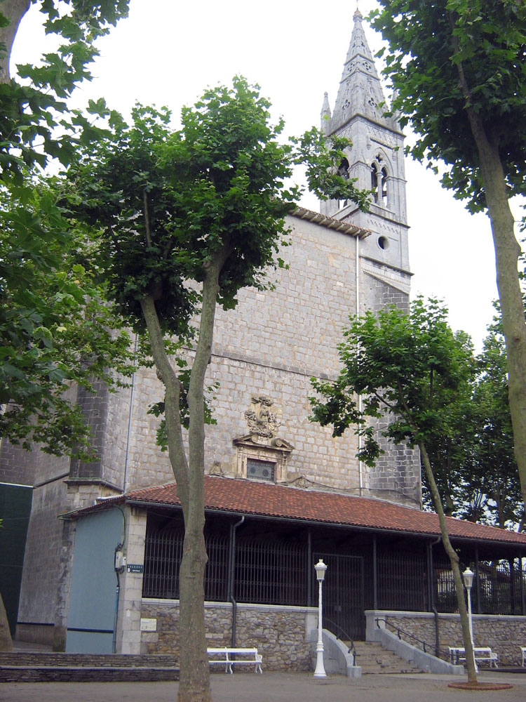 Iglesia de Santa Maria en Mundaka, vista desde el parque que hay en sus alrededores.